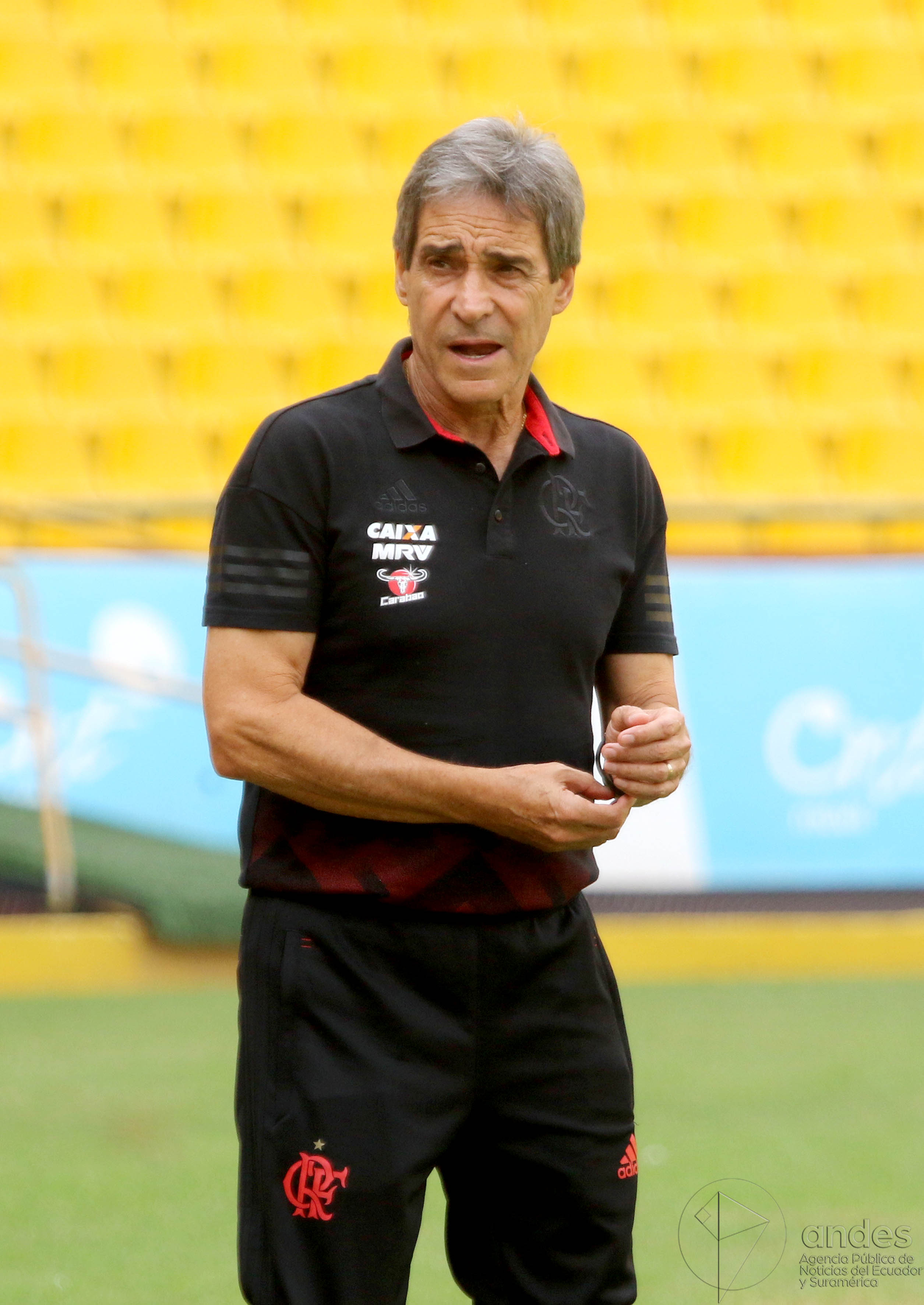 Guayaquil, martes 13 de marzo del 2018 (Andes).-El equipo brasileño Flamengo entrenó en el estadio Monumental previo al partido contra Emelec por el grupo D de la Copa Libertadores a jugarse mañana miércoles en el estadio George Capwell. En la gráfica el DT. Paulo César Carpegiani. Foto:Andes/César Muñoz